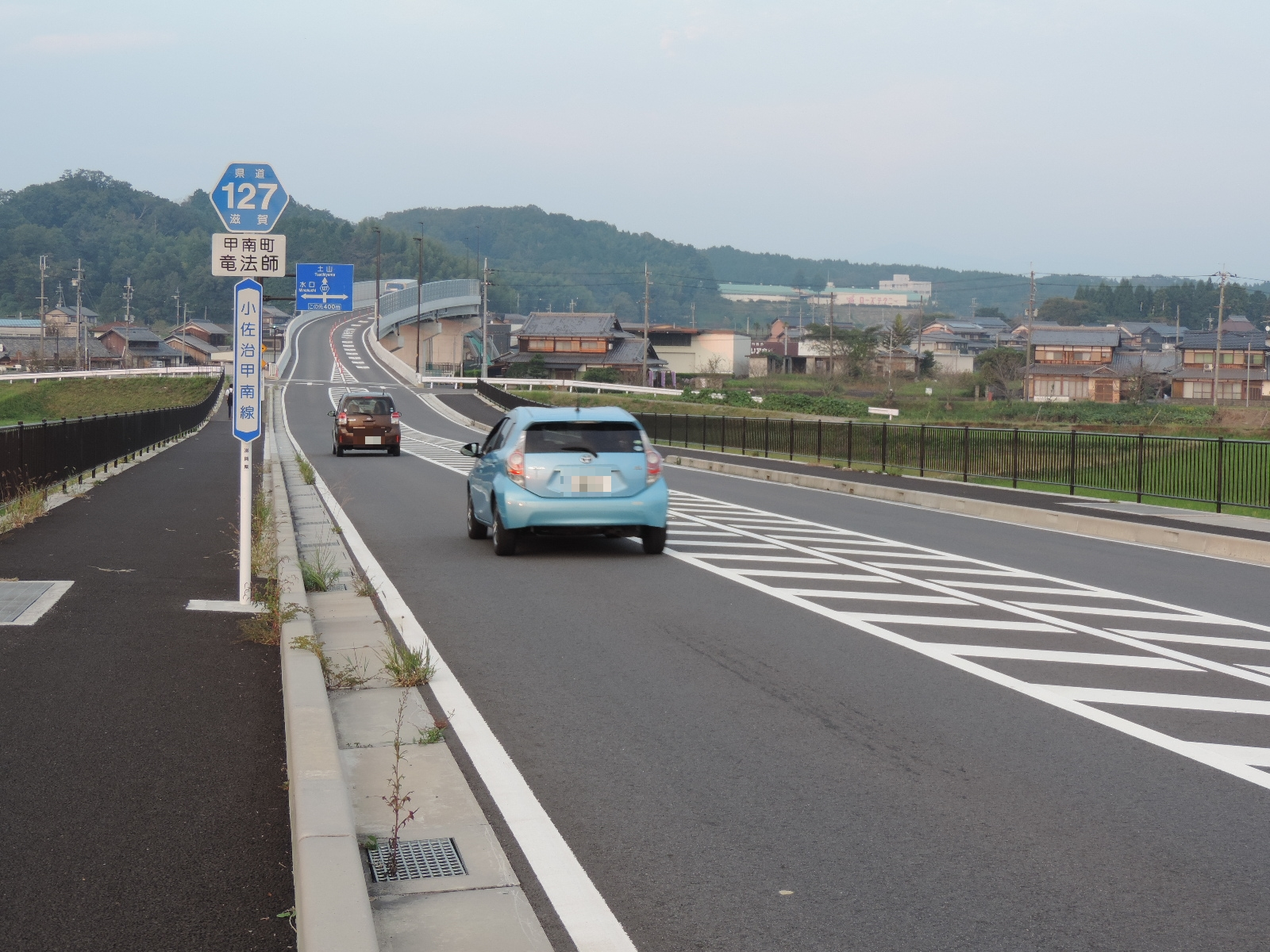 滋賀県道127号小佐治甲南線。滋賀県甲賀市甲南町竜法師にて。